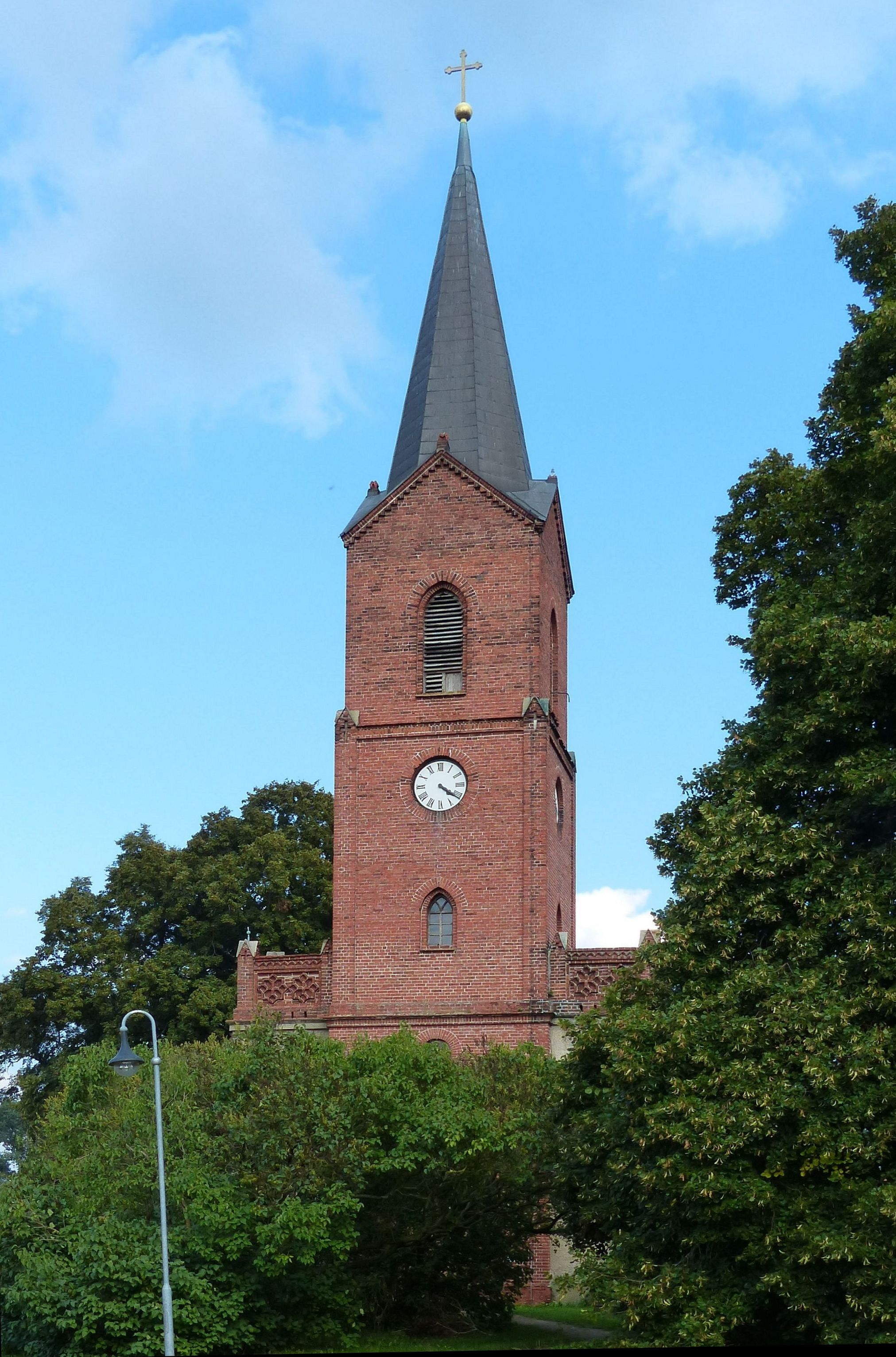 Die 1849 als Patronatskirche geweihte Kirche ist ein Nachfolgebau einer spätromanischen Kirche, die 1844 bei einer Feuerbrunst - wie fast das ganze Dorf Schollene - verwüstet wurde. Sie wurde im neugotischem Stil errichtet.